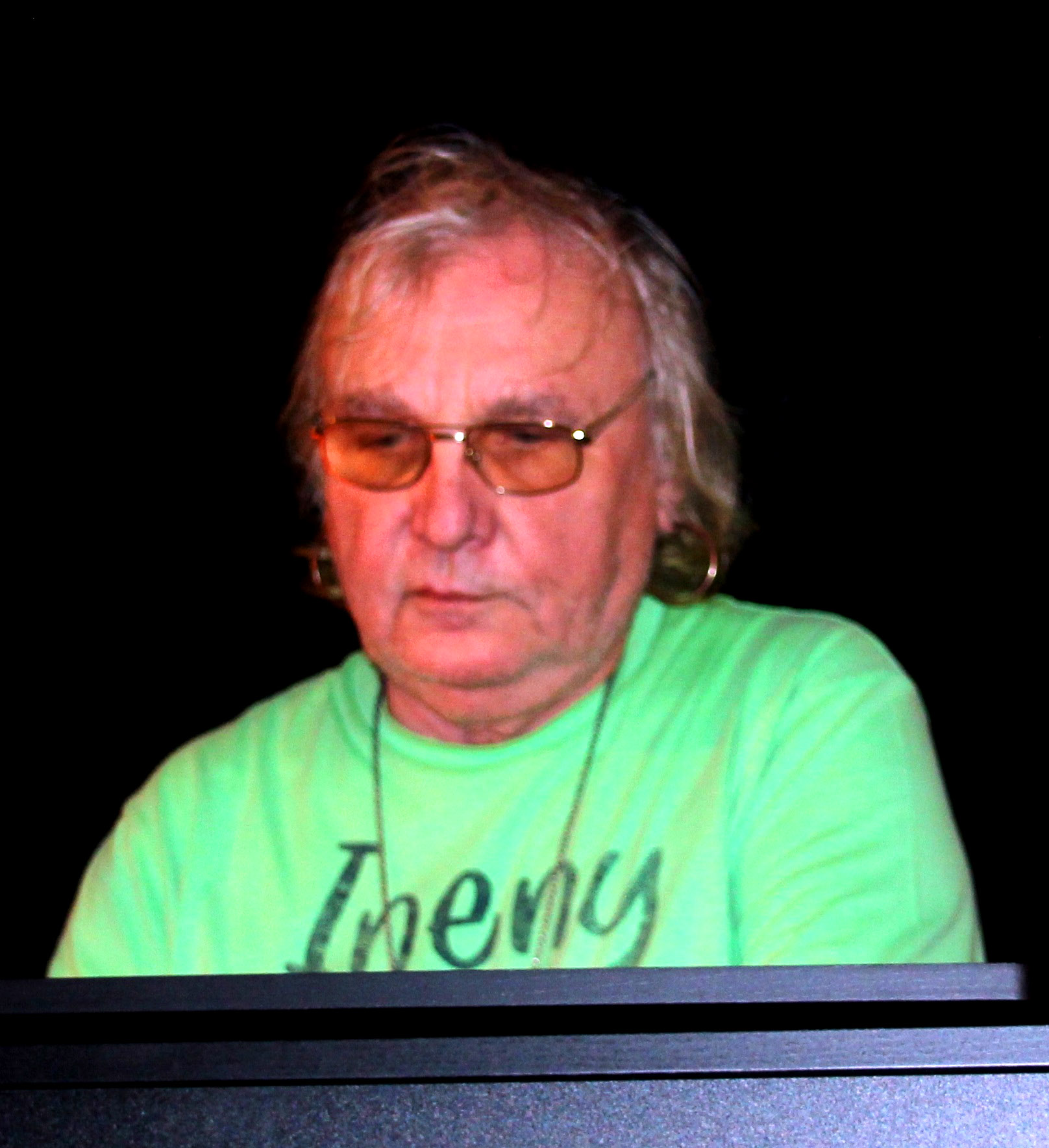 Wolfgang Mader, 2019